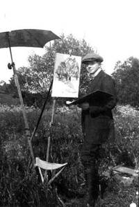 Alfred Holler (1888-1954), deutscher Landschaftsmaler und Grafiker.